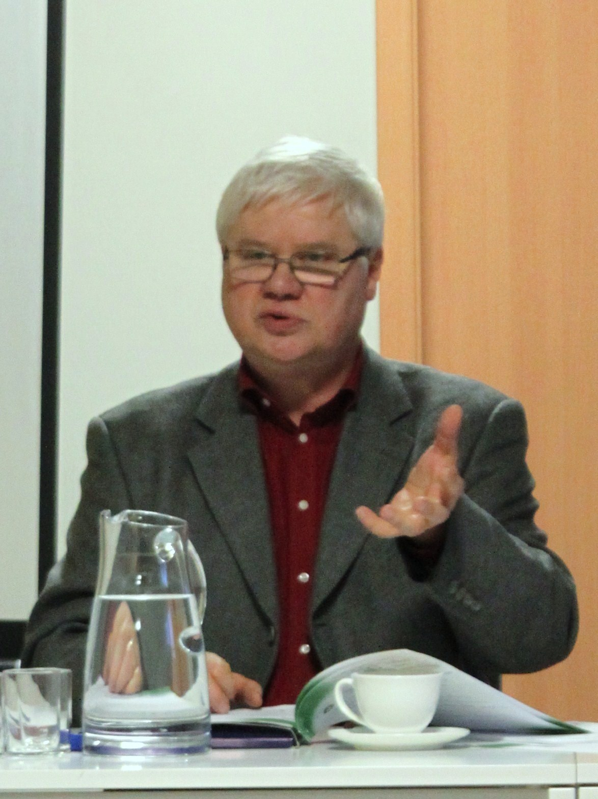 Seminarium Kompetencje kadr kultury a rozwój kapitału społecznego, Jerzy Hausner.